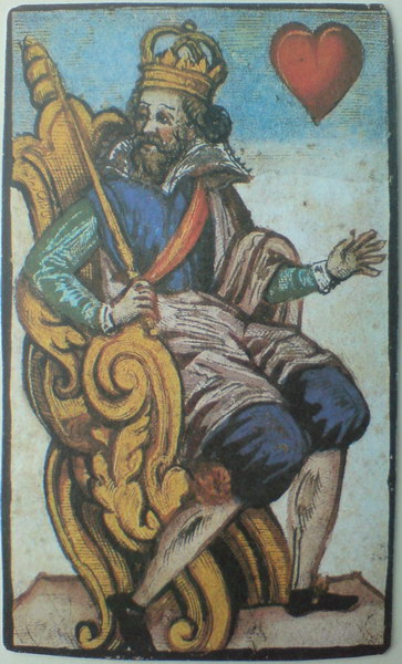 Król Czerwienny z 48 kart niemieckich